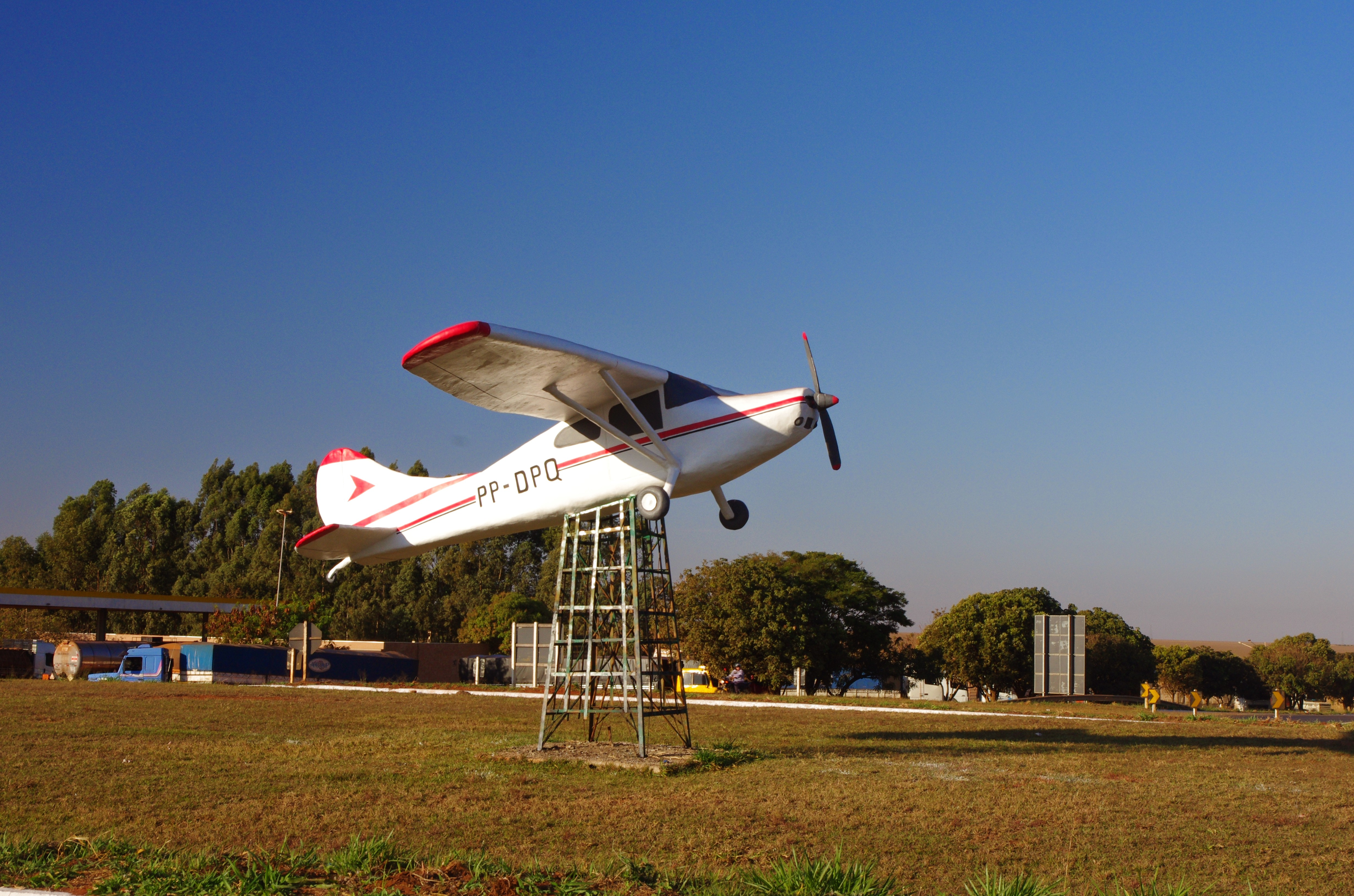 Costa Rica - MS, Brazil